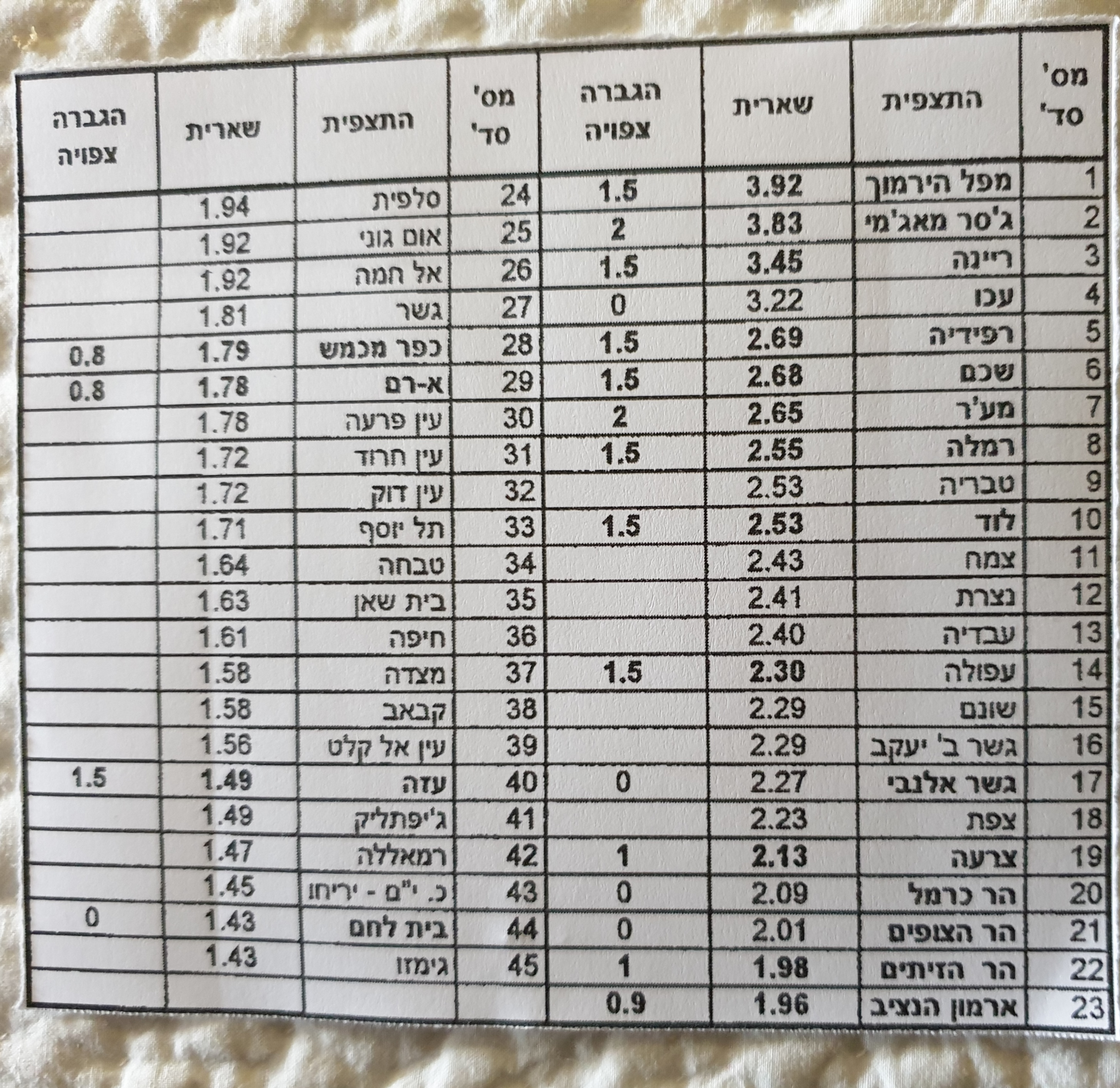 Sites and settelments that suffered more than expected according the distance from the epicenter.